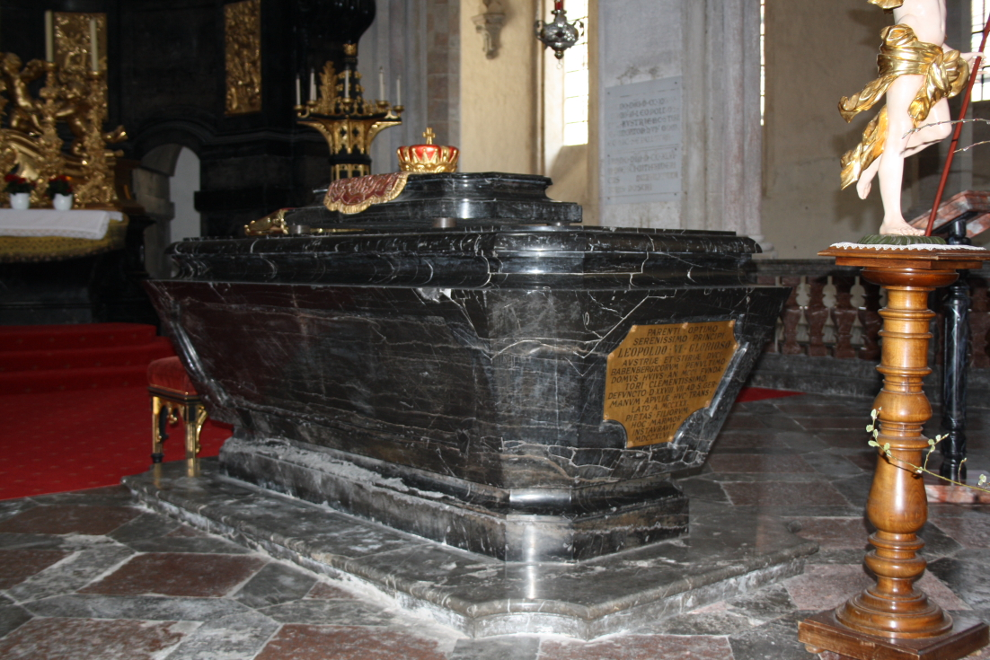 Sarkophag von Leopold VI. im Stift Lilienfeld, Niederösterreich